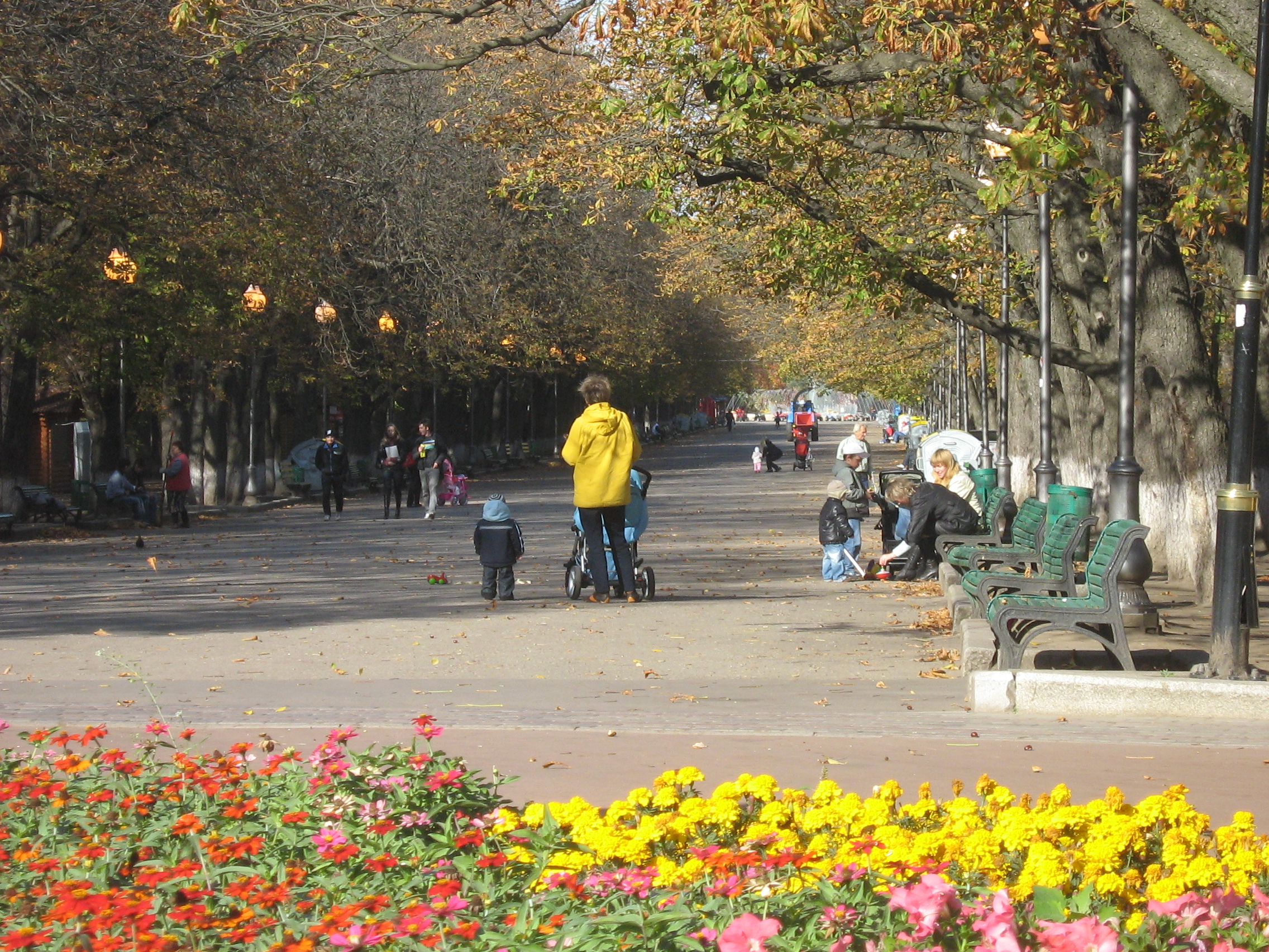 Kharkov Gorky Park Central Alley in Autumn. Центральная аллея ЦПКиО им. Горького в Харькове. Вид от центрального входа в сторону фонтана.